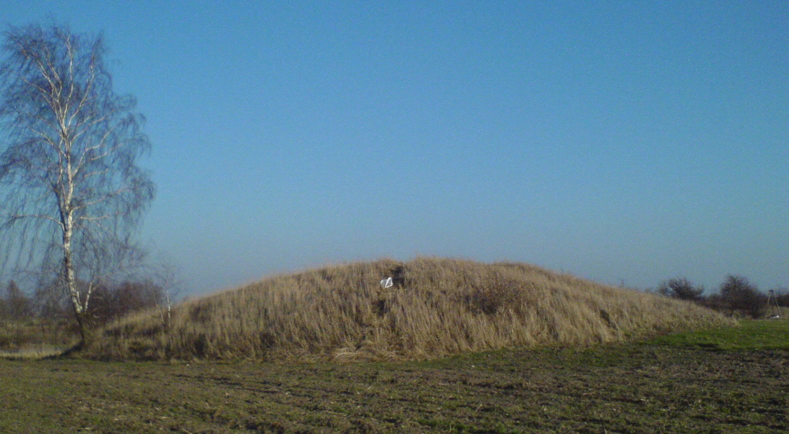 Kurhan 3 - Łęki Małe, Wielkopolskie Piramidy